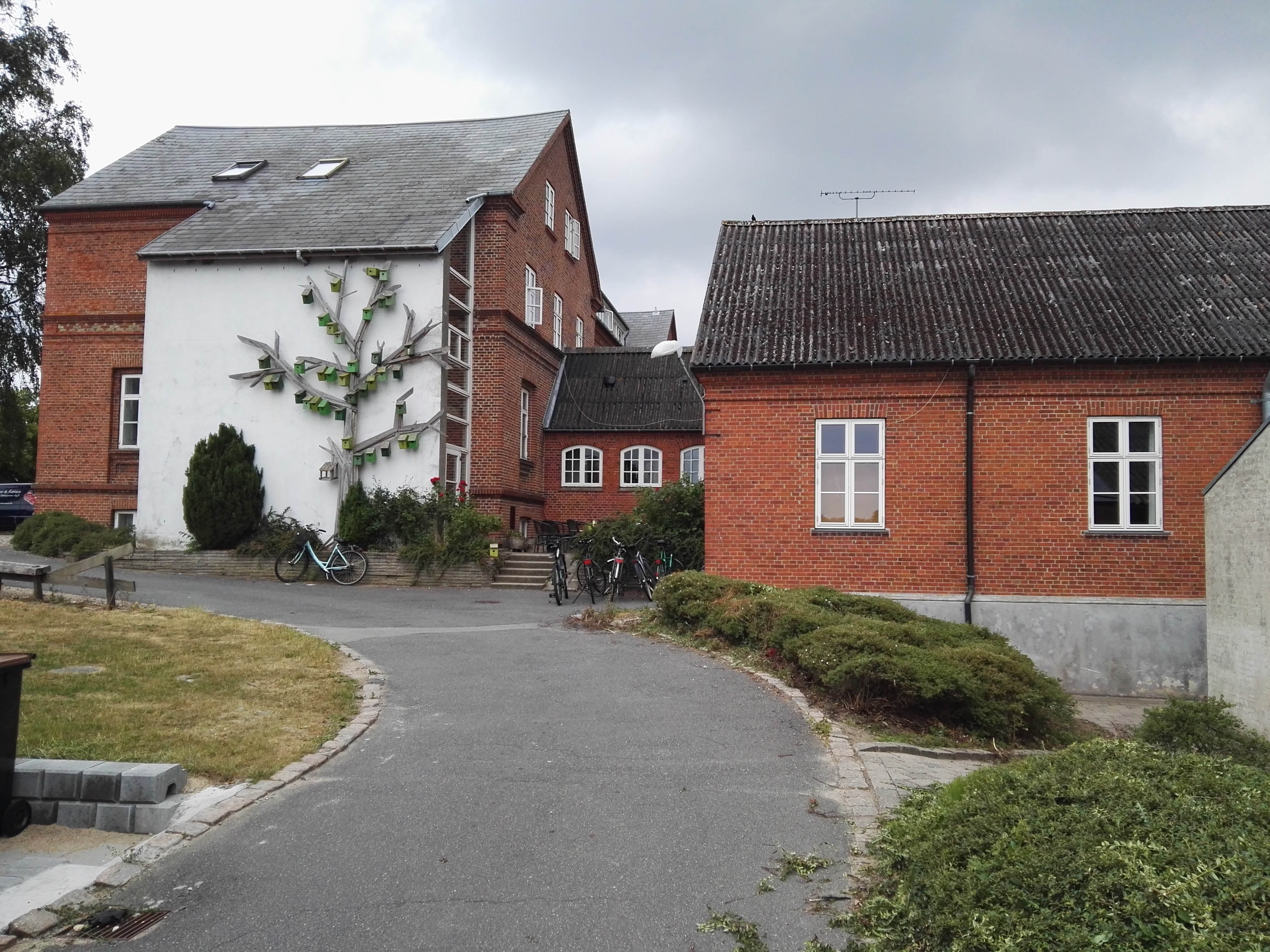 Den Frie Lærerskole i Ollerup